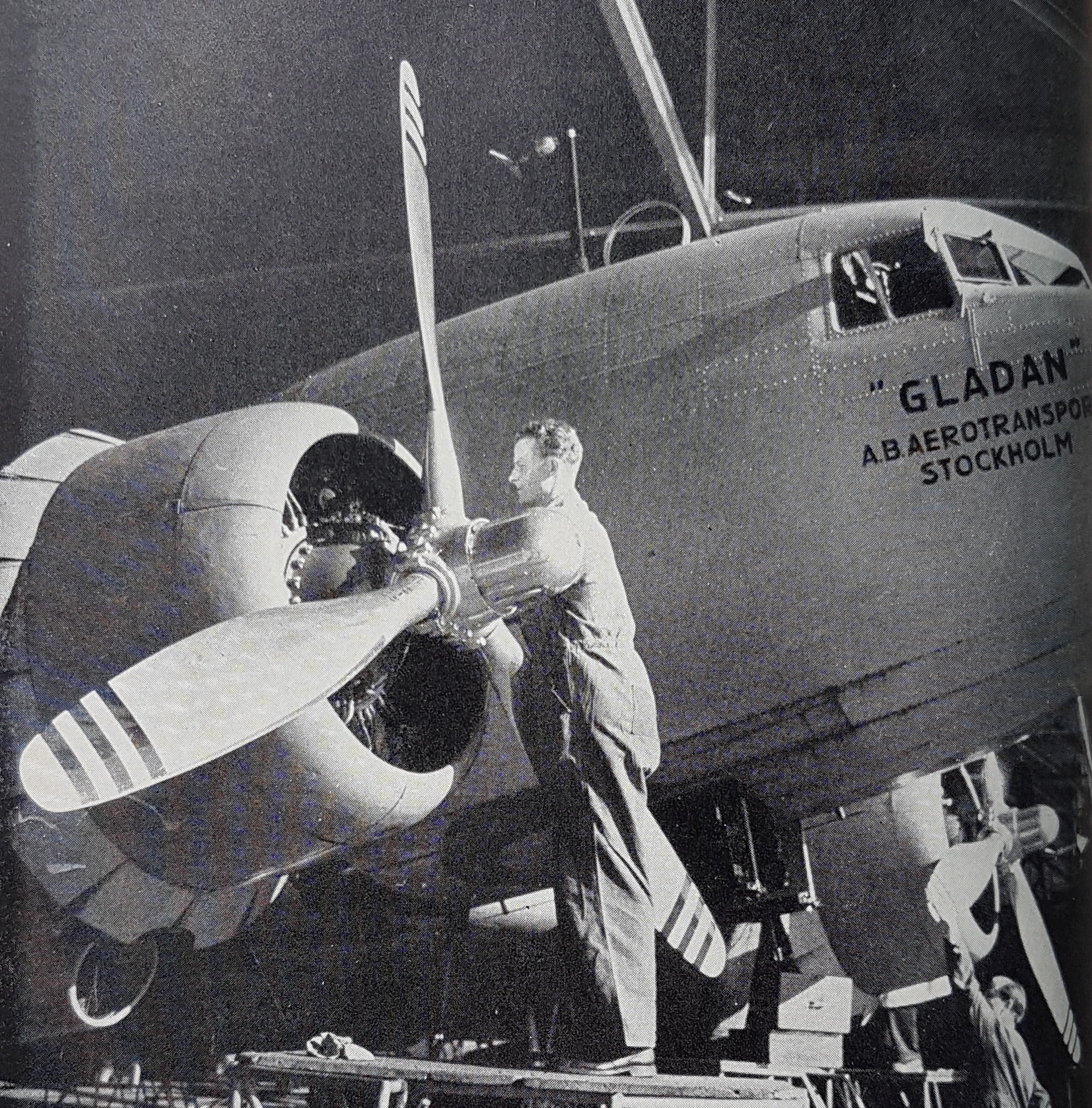 Gladan förberedd för sin sista flygning